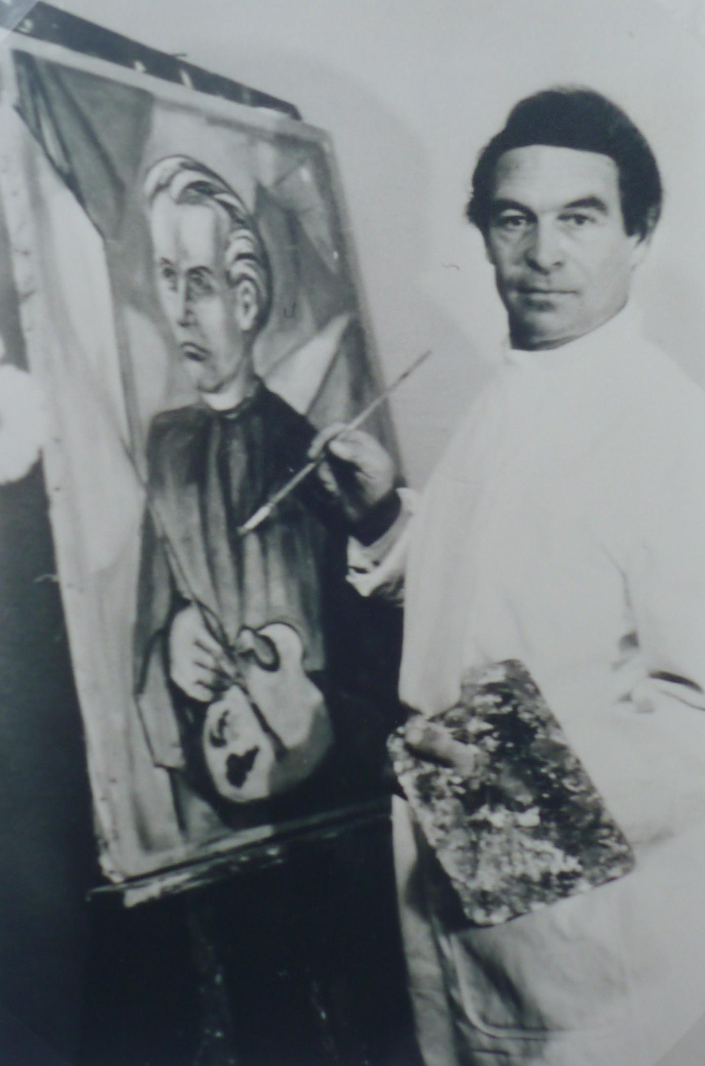 Philipp Dott in seinem Atelier (1961). Das Bild stammt aus privater Sammlung von Marita Warnke.